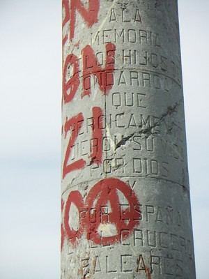 Baleares gurutze-ontzian 1938an hildako errekete ondarroarren omenezko gurutzea Ondarroako Arta Puntan, 2006 urtean.. Idazkunaren detailea.